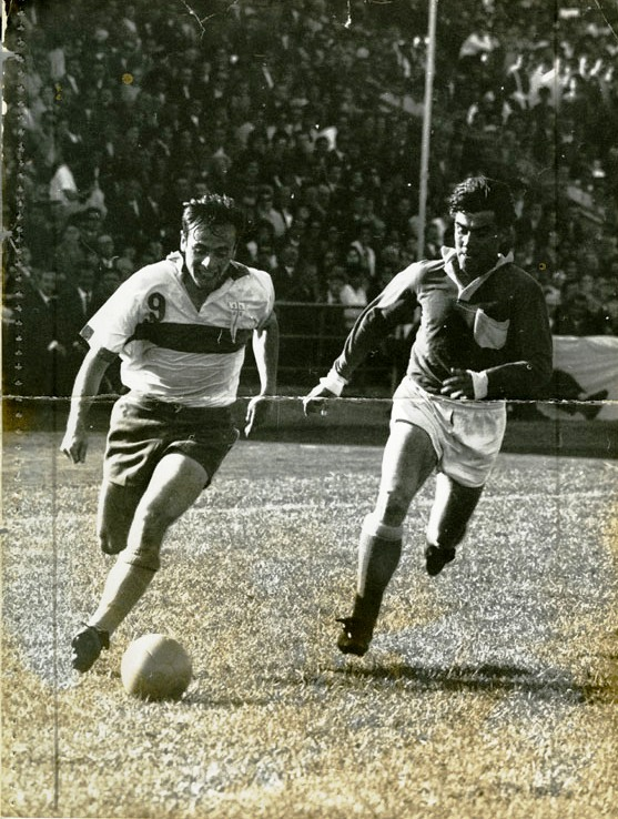 Fouilloux, Alberto. Jugador de la Selección Chilena año 1966/ No identificado.